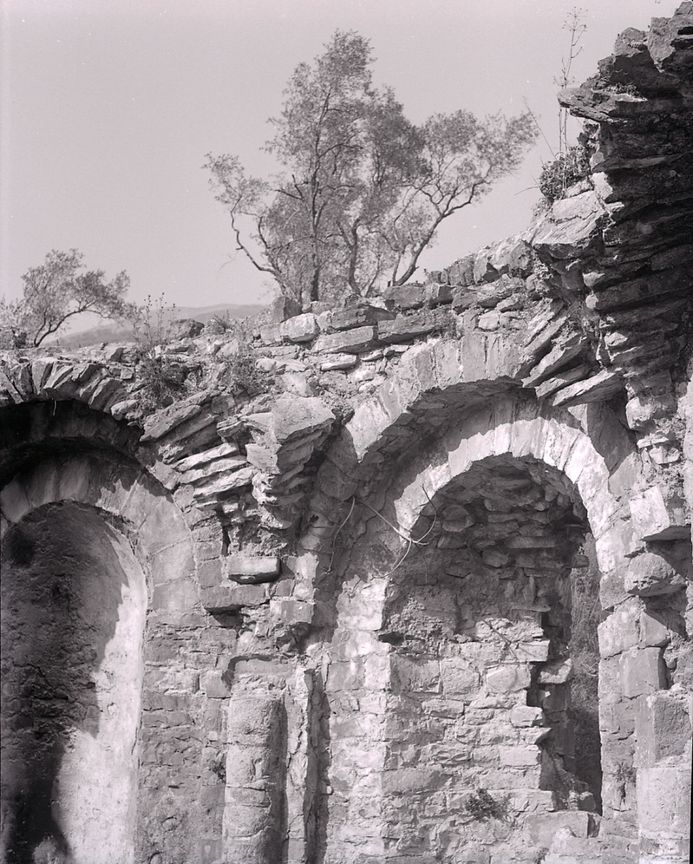 Lario. Isola Comacina. Rovine della Basilica di Sant'Eufemia. Serie fotografica : Ossuccio, 1975 / Paolo Monti. - Buste: 5, Fototipi: 5 : Negativo b/n, gelatina bromuro d'argento/ pellicola ; 6x6. - ((Serie costituita da 5 negativi identificati con la numerazione: 3559-3563. Sulla busta R3559 manoscritto: "Isola Comacina". La suddetta serie è contenuta nella scatola identificata con la numerazione R3499/3788. Sul coperchio iscrizione manoscritta a pennarello: "1 Località varie".